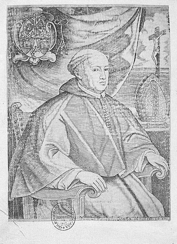 Fray Alonso de Santo Tomás, obispo de Málaga, grabado de la Biblioteca Nacional